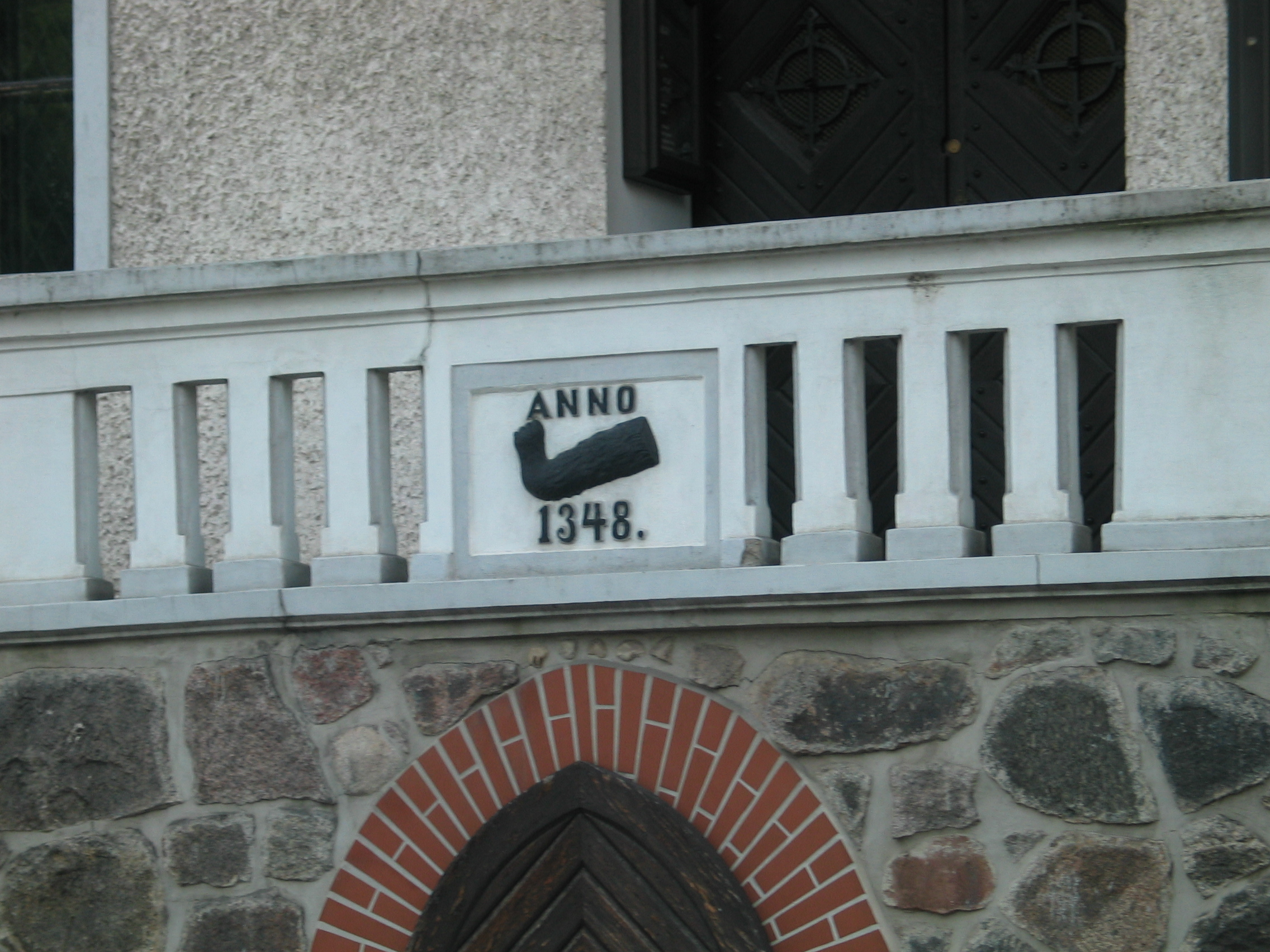 Herb Mrągowa na Ratuszu miejskim W Mrągowie